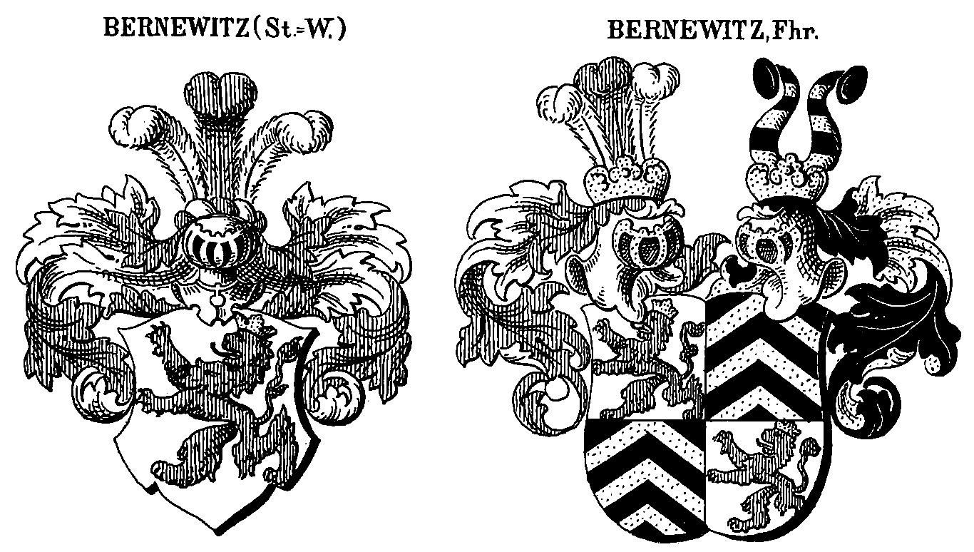 Stamm- und Freiherrenwappen der von Bernewitz